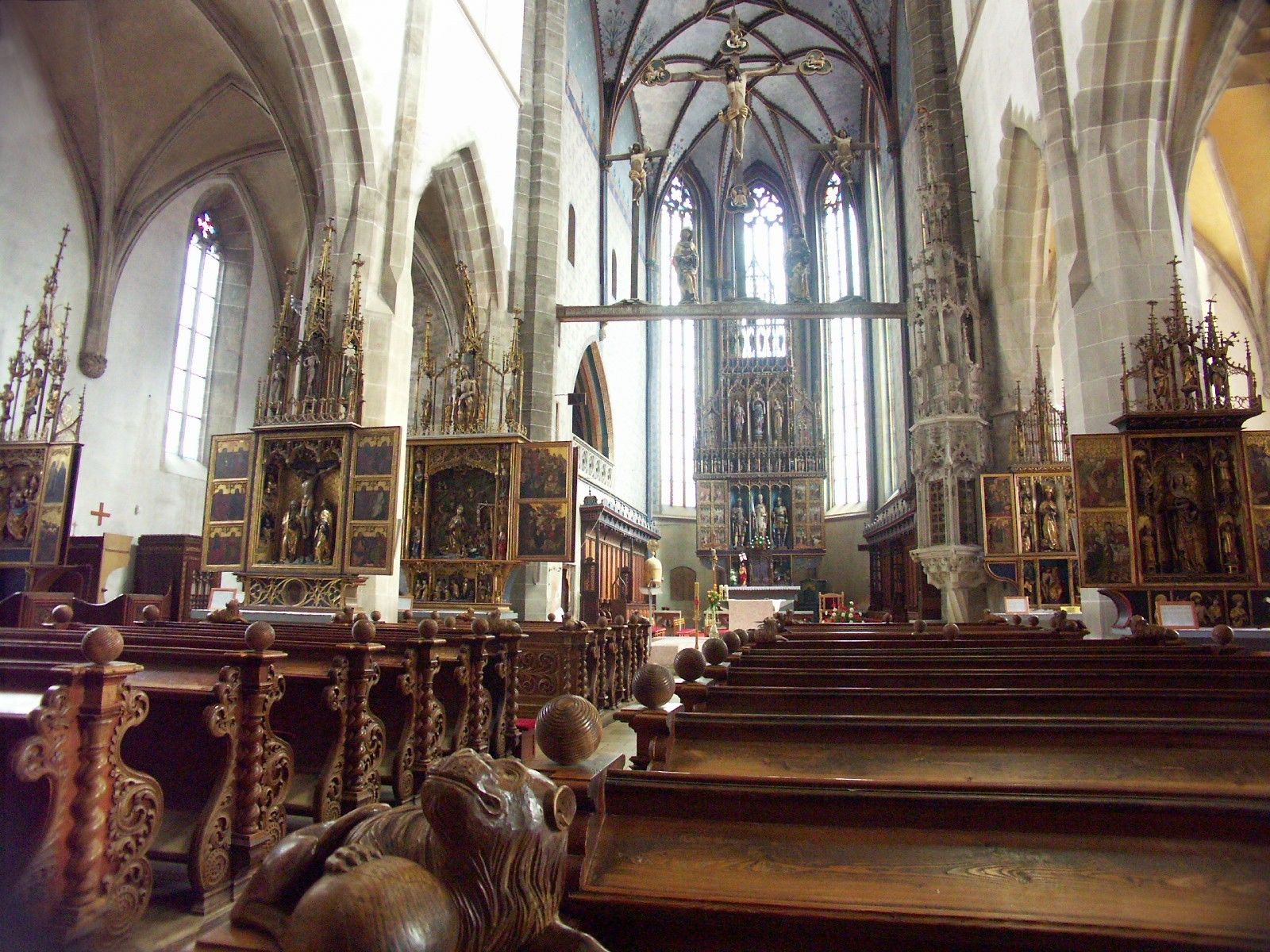 Szent Egyed templom, Bártfa. Bazilika Sv. Egídia (Bardejov)